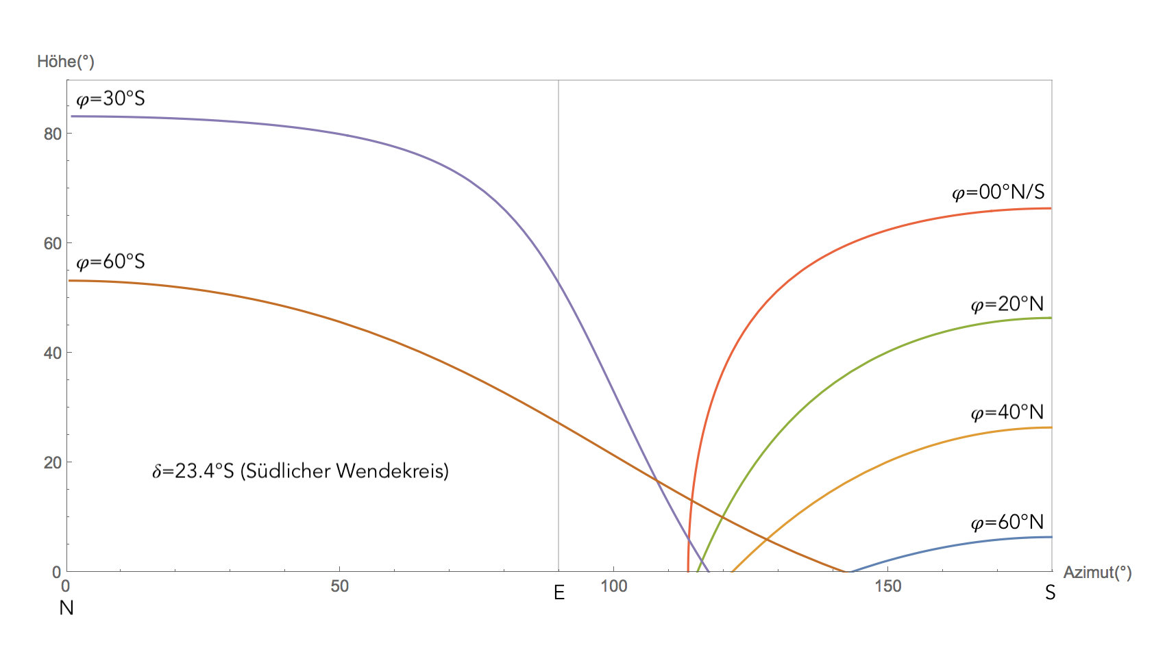 Azimut und Steilheit des Sonnenaufganges bei N-Winteranfang